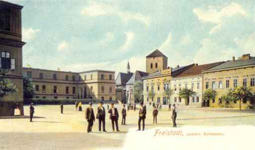 Zámek Fryštát v Karviné